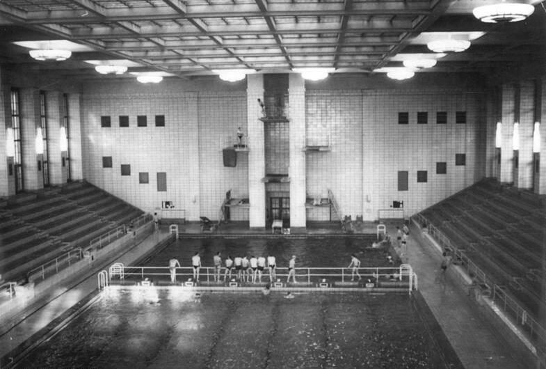 Rostock, Schwimmhalle "Neptun" Zentralbild Nellahn 3.2.1959 Rostock - Stadt des VI. Parlaments der BDJ Ein bedeutsamer Höhepunkt im Kampf der jungen Generation der DDR für den Frieden, die Wiedervereinigung Deutschlands und den Sieg des Sozialismus in ihrem Arbeiter- und Bauernstaat wird das VI. Parlament der FDJ, das der Zentralrat für die Zeit vom 12. bis 15. Mai 1959 nach Rostock einberufen hat. Im Anschluß an das Parlament wird bis zum 16. Mai ein Fest der Jugend stattfinden. 50.000 Jungen und Mädchen aus allen Bezirken der DDR werden das Treffen miterleben. UBz: Nahezu 20 Millionen DM hat unser Staat für den Bau des großen Sportforums an der mecklenburgischen Ostseeküste in Rostock verausgabt. So entstanden unter anderem das Ostseestadion für etwa 30.000 Zuschauer, ein Eisstadion und eine der modernsten Schwimmhallen Europas. Blick in die imposante Schwimmhalle.